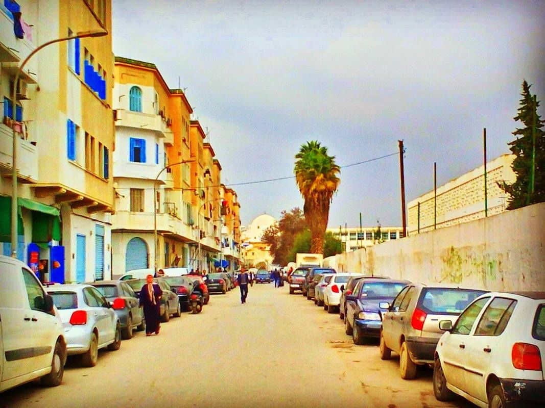 La médina de Tunis, Tunisie مدينة تونس العتيقة ، تونس